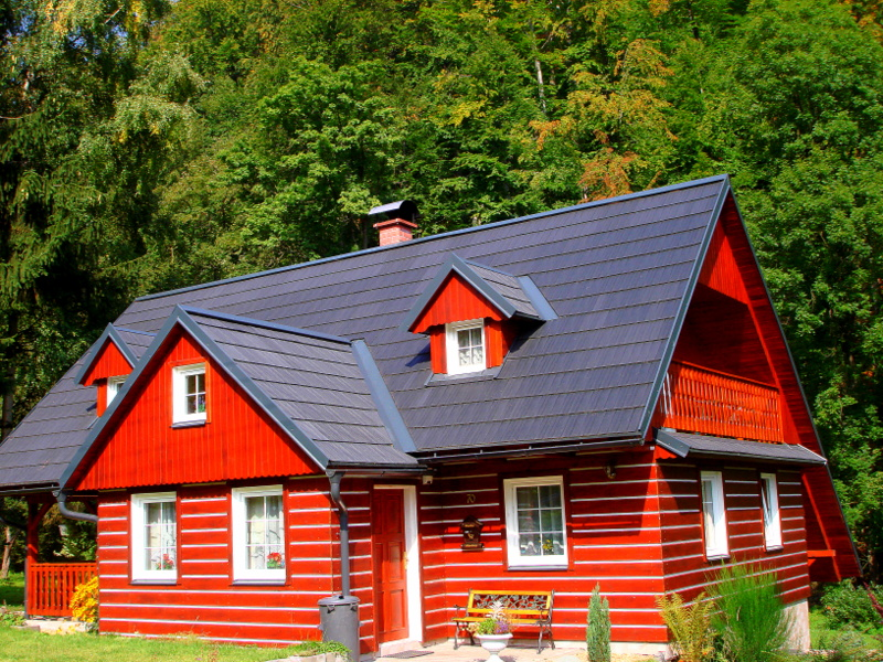 Zaclerz, Drewniana Dolina (Prkneny Dul)